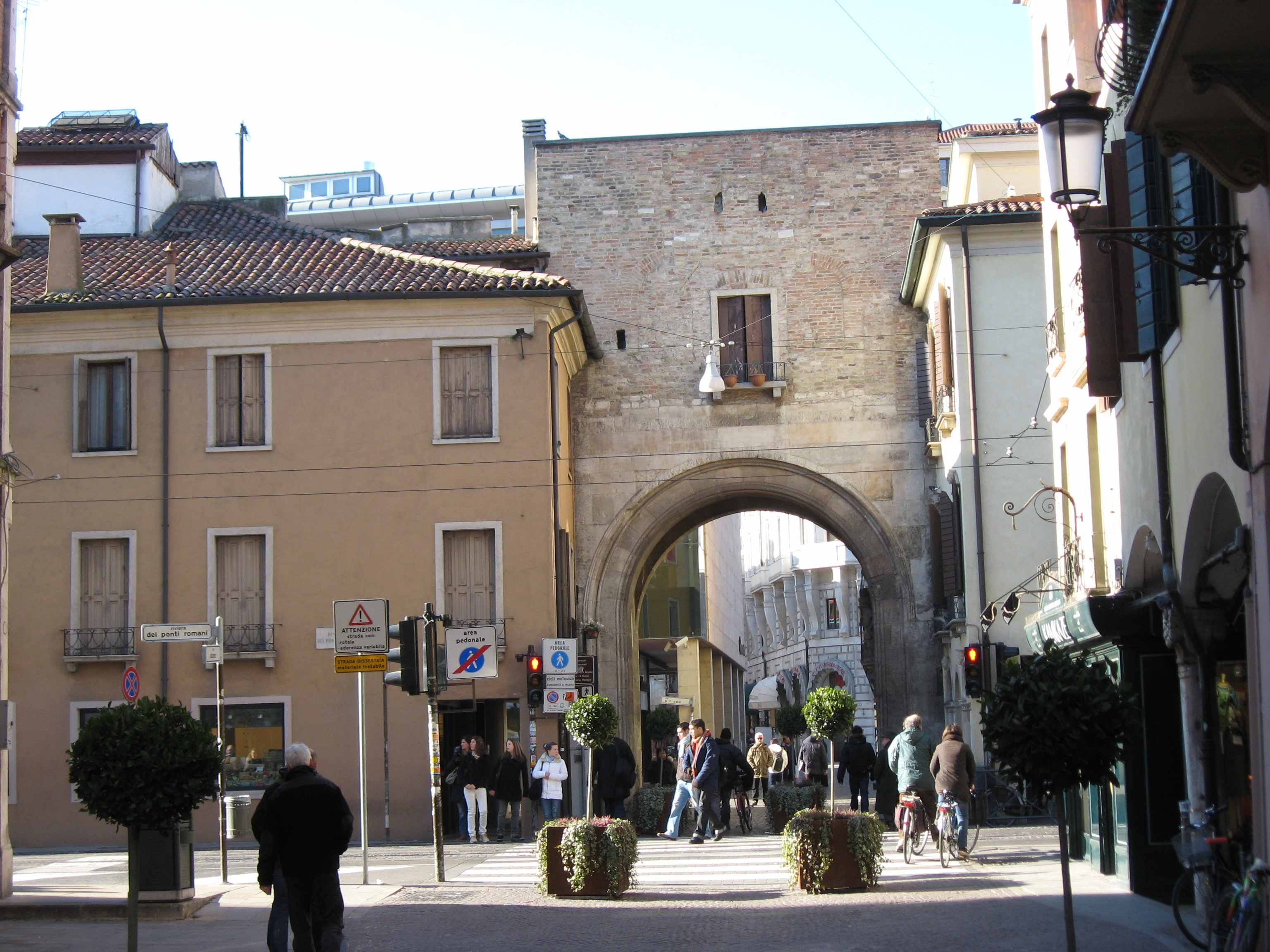 Porta Altinate